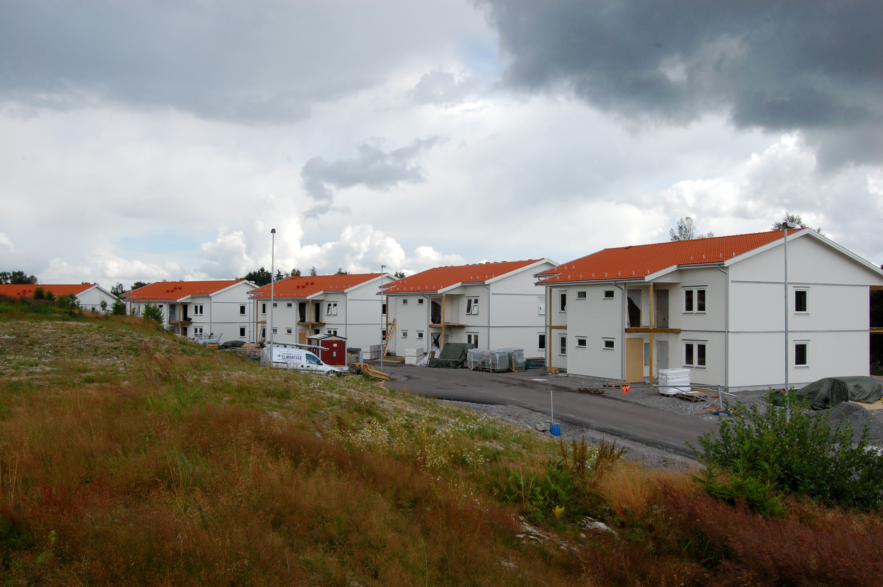 Arbetet med de fem bostadsrättshusen på Prästnäset i Töcksfors med sammanlagt 20 lägenheter pågick sommaren 2012.